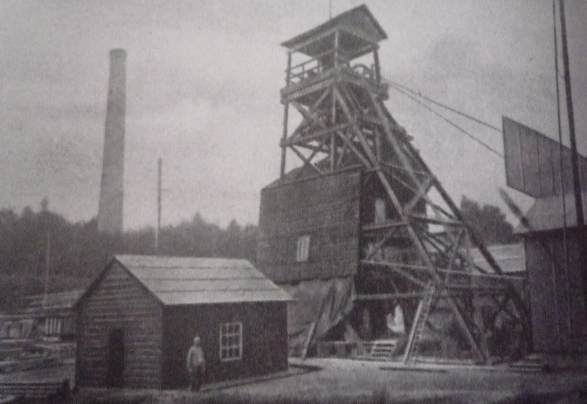 La fosse no 2 dite Saint-Émile de la Compagnie des mines de Marles était un charbonnage du bassin minier du Nord-Pas-de-Calais constitué d'un seul puits situé à Marles-les-Mines, Pas-de-Calais, Nord-Pas-de-Calais, France. L'avaleresse no 1 est localisée sur le site. Le chevalement de la fosse no 2 avec les parties anciennes du bâtiment de la machine d'extraction sont inscrits aux monuments historiques le 6 mai 1992. La fosse est également inscrite sur la liste du patrimoine mondial par l'Unesco le 30 juin 2012 et y constitue le site no 101.